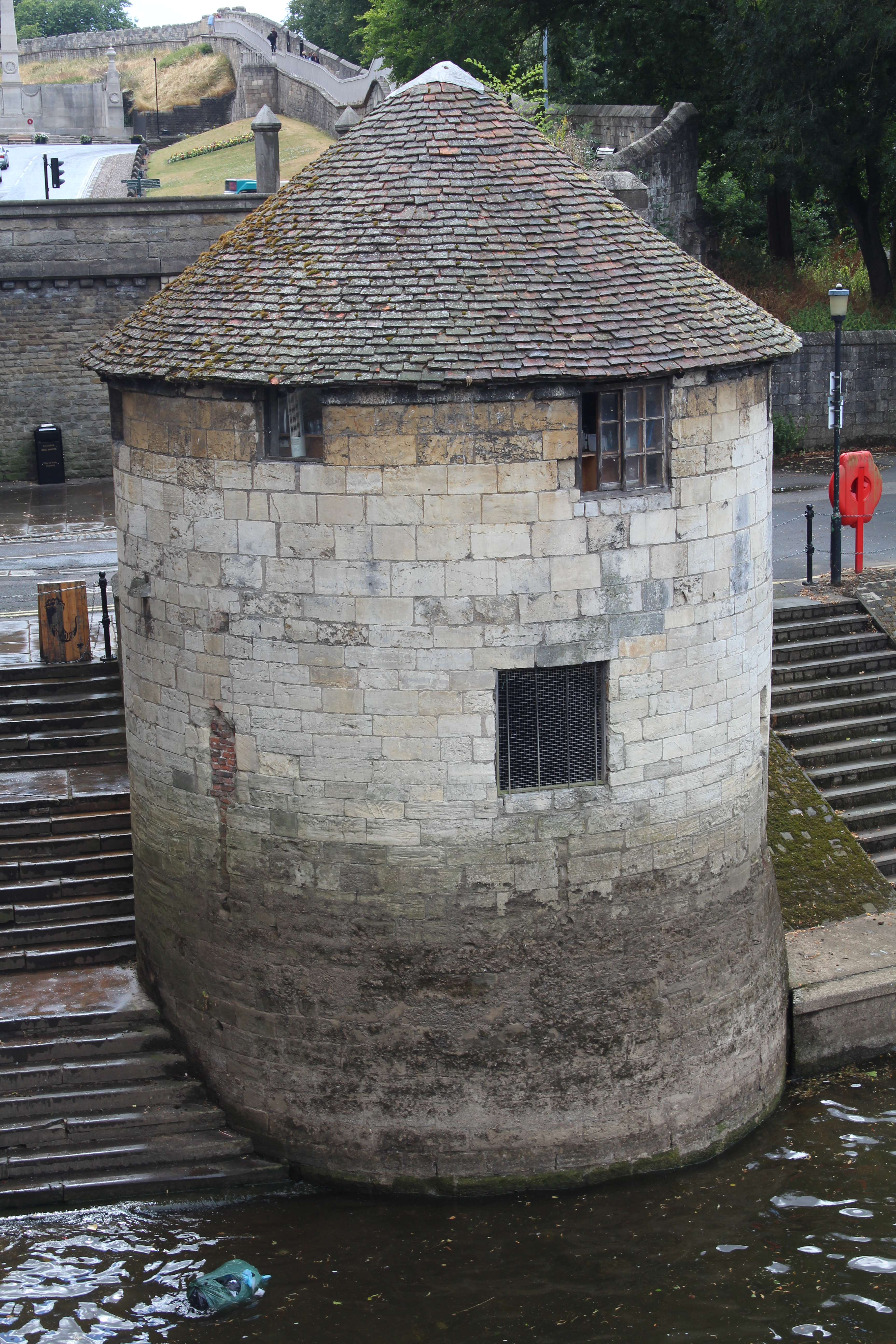 Tour 28, York.